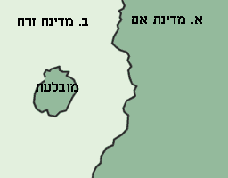 תרגם לעברית של מפת המובלעת hebrew version of Image:Enclave.png